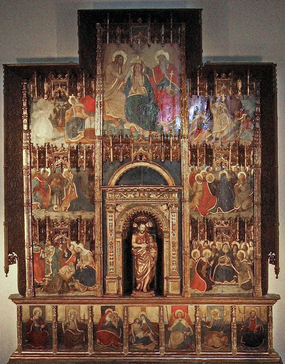 Retaule de Sant Joan, procedent del santuari del Vinyet. És una de Jaume Forner. Hospital de Sant Joan de Sitges, Catalunya.